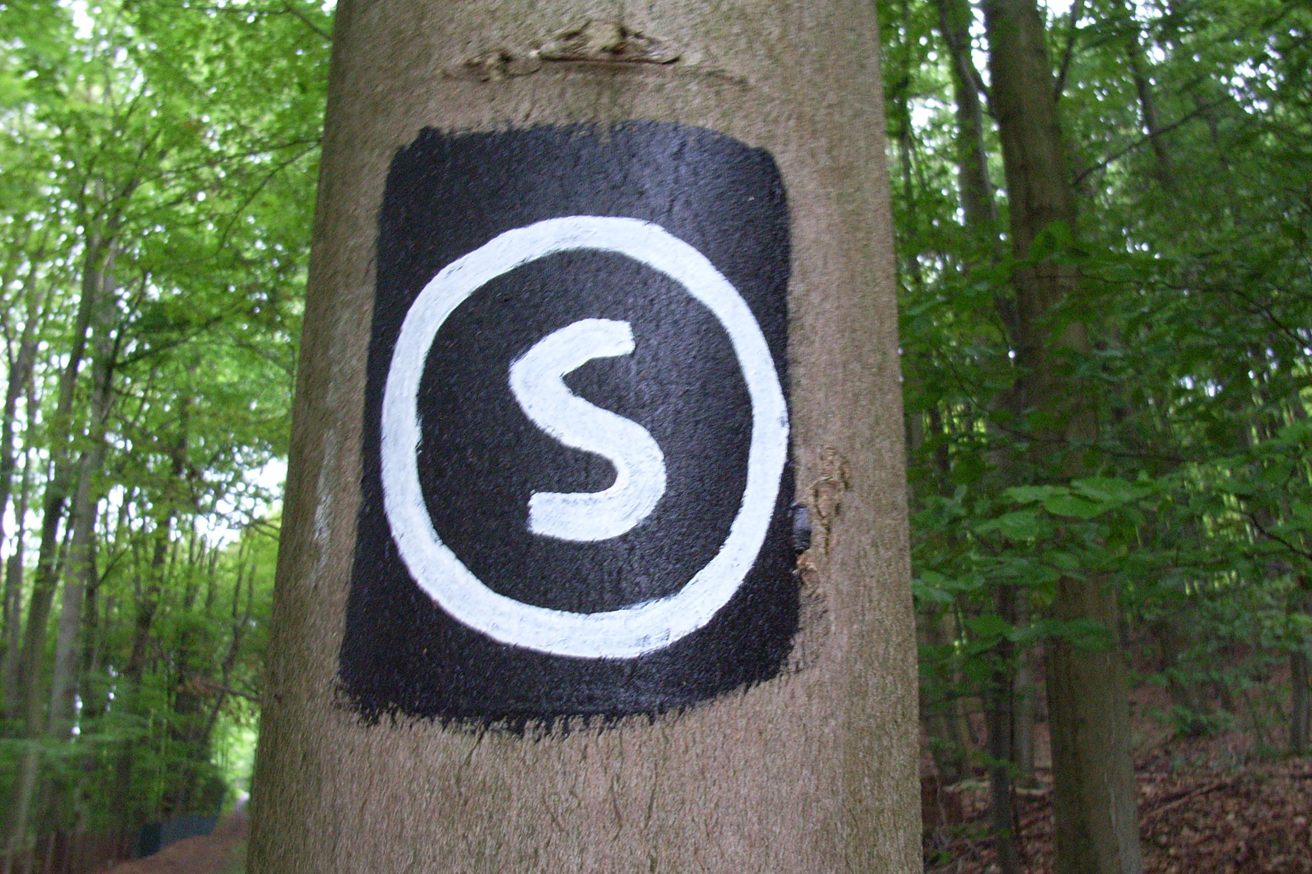 Das Wanderzeichen des Sachsenringes, der um Bad Driburg führt.